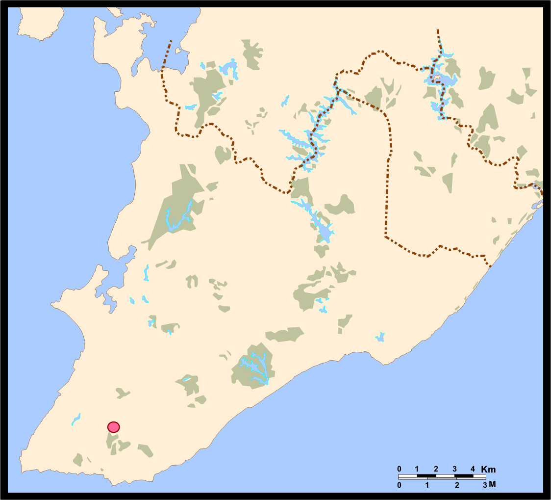 Mapa de Salvador (Bahia, Brazil) - Localização do bairro de Brotas.